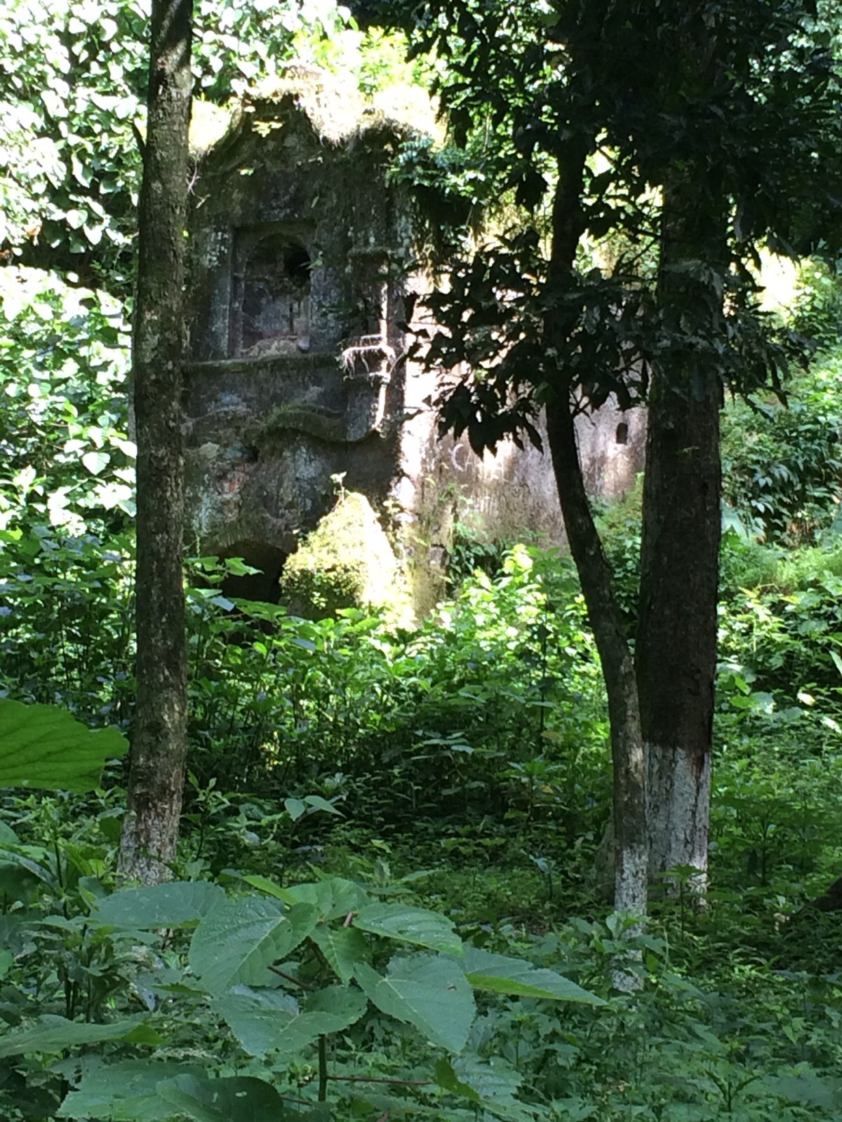 Convento, oratorio y acueducto de los Jesuitas en Fraijanes, Guatemala.